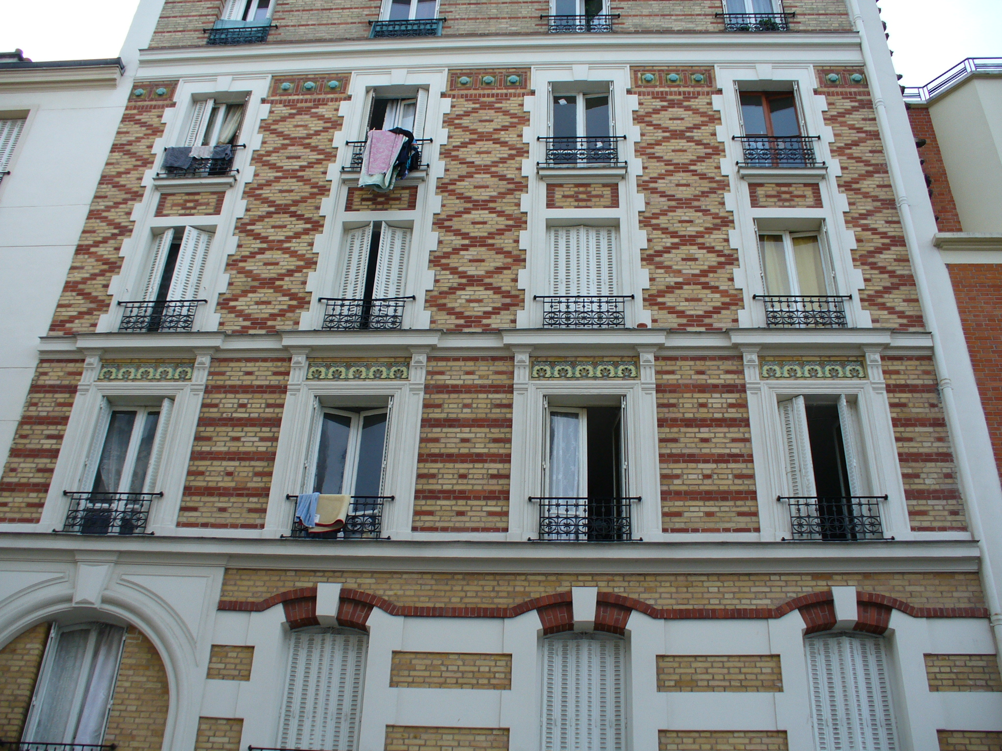 Pantin Maison en briques